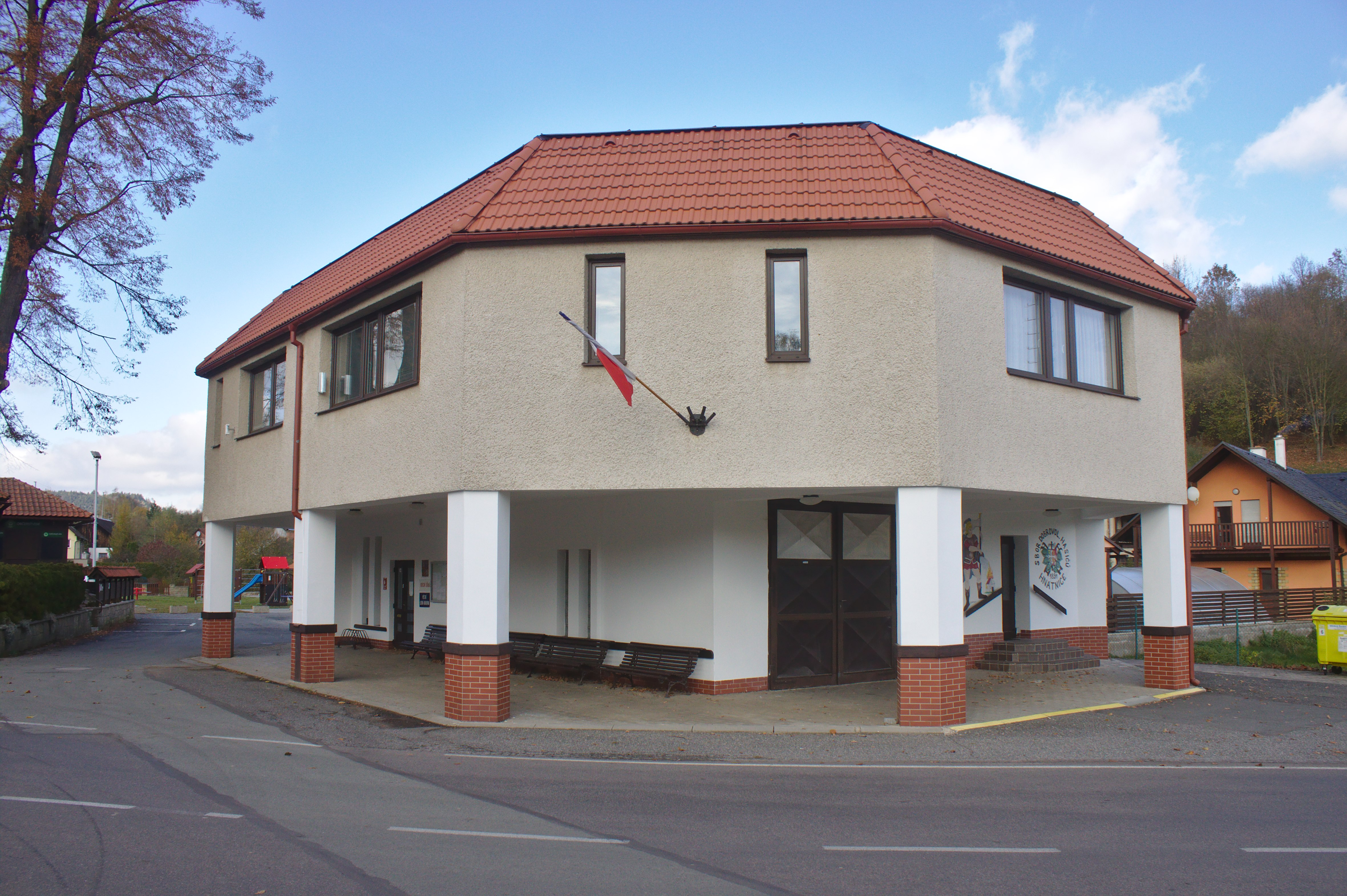 Obecní úřad v obci Hnátnice v Pardubickém kraji